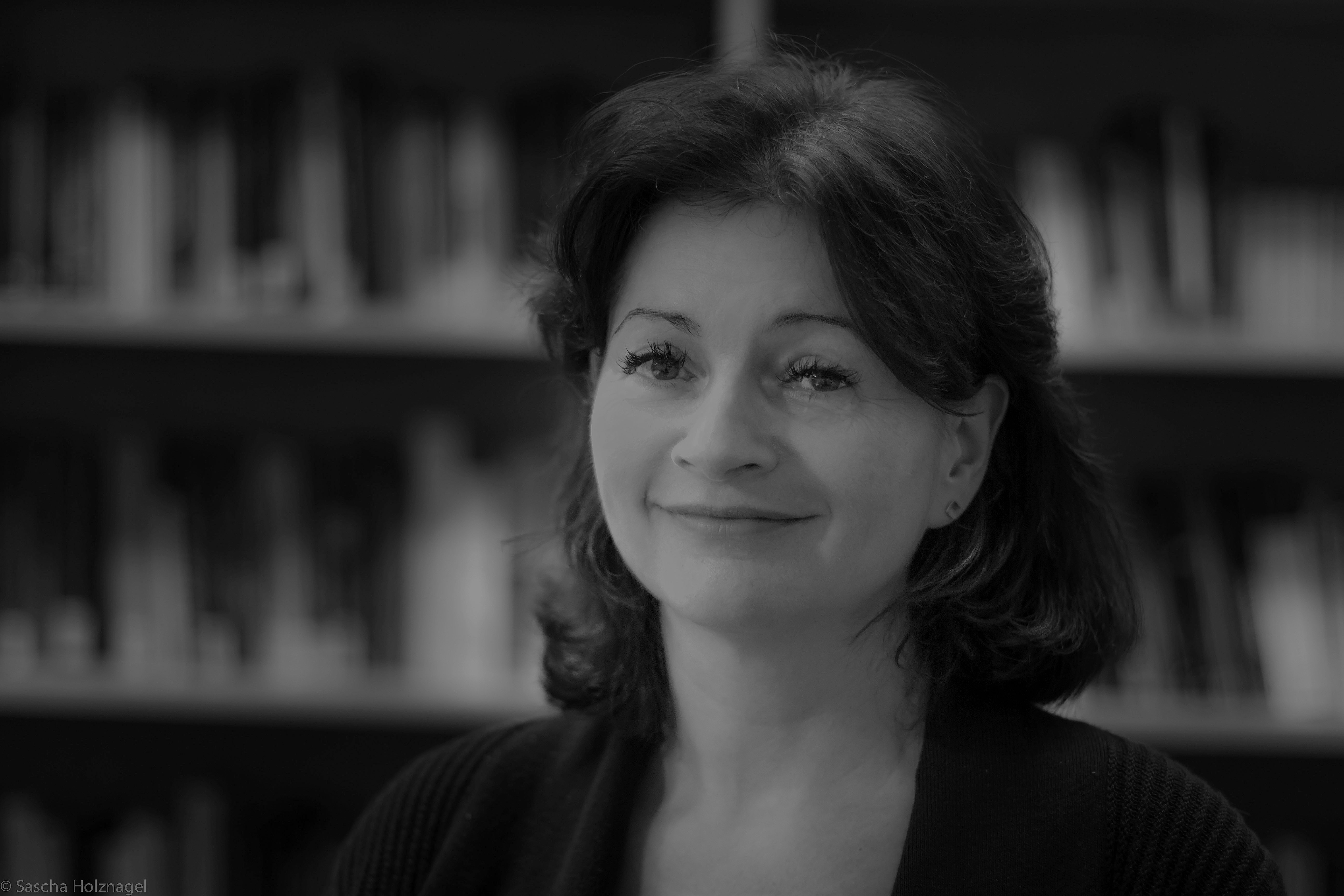 Foto